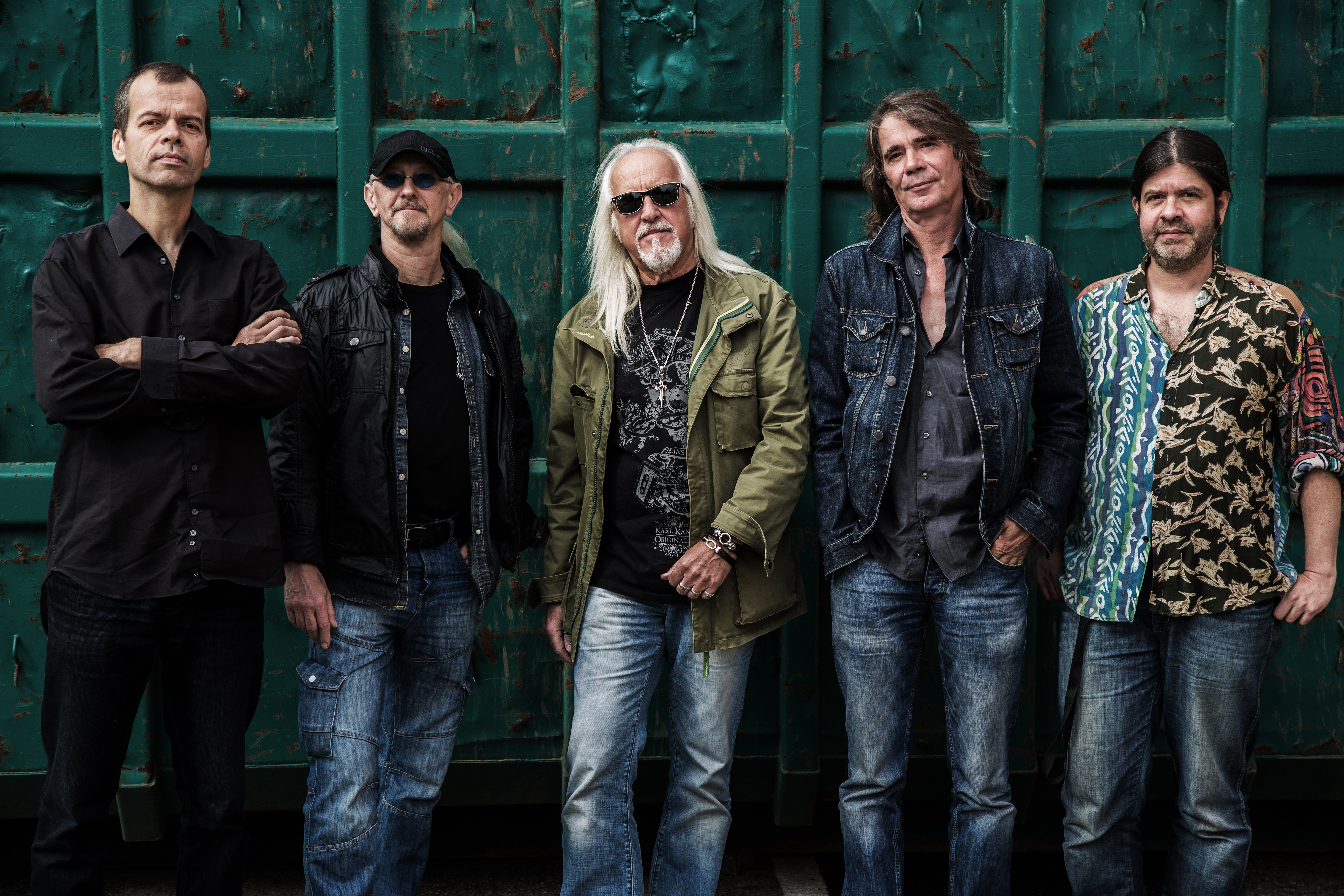 Hannes Vesper, Manni von Bohr, Martin Ettrich und Peter Föller der deutschen Krautrockband Birth Control.